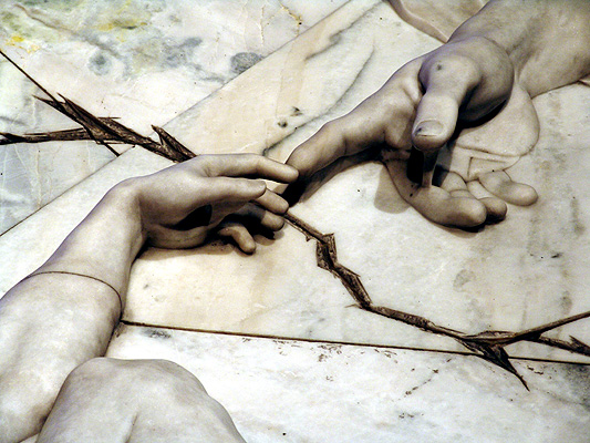 Detail of "Creation" of sculptor Carlos Enrique Rodríguez Arango, a work in marmol in the Salt Cathedral (Zipaquirá, Colombia) / Detalle de la "Creación", del maestro Carlos Enrique Rodríguez Arango, exhibida en la Catedral de Sal (Zipaquirá, Colombia). La mano de Dios es considerada pelo autor tres veces más grande que la mano del hombre.